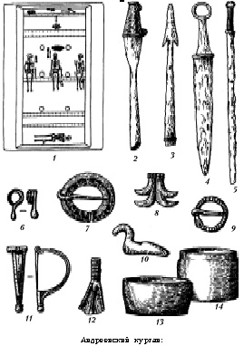 Андреевский курган: 1 — план центрального погребения; 2, 3 — наконечники копий; 4 — кинжал; 5 — меч; 6 — височная подвеска; 7 — застежка; 8, 10 - привески поясные; 9 — пряжка; 11 — фибула; 12 — привеска накосника; 13, 14 — сосуды (2, 5 — железо, бронза; 3, 4 — железо; 6 — золото; 7—12 — бронза; 13, 14 — глина).